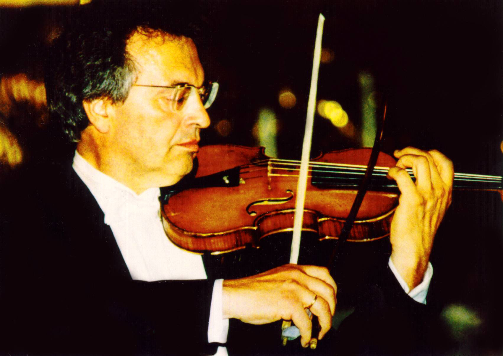 Rudolf Gaehler, violin with curved bow